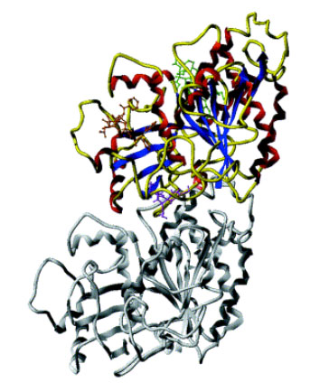 Kötöhelyek modellje dimeren